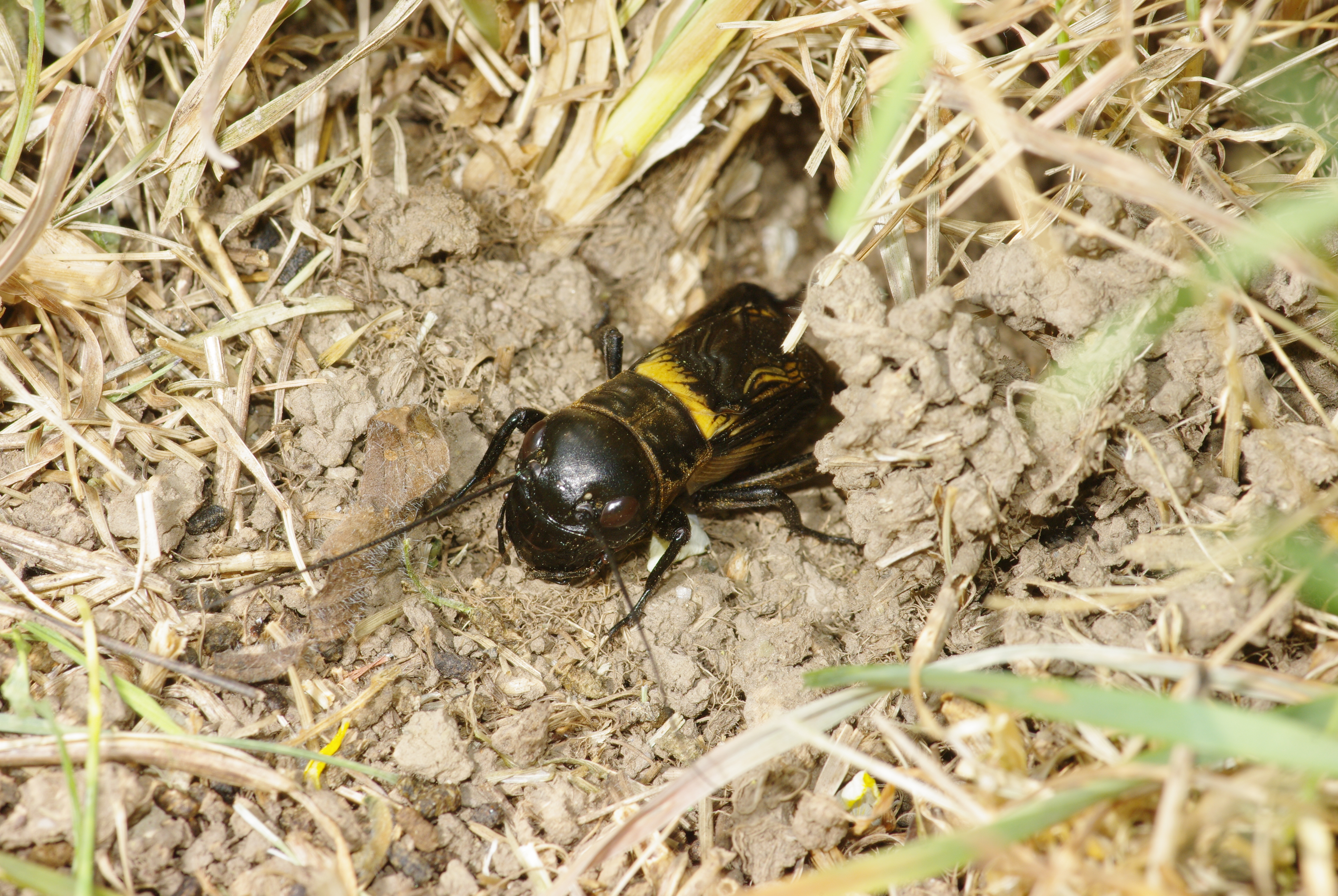 Grillon champêtre émergeant de son terrier (Normandie).